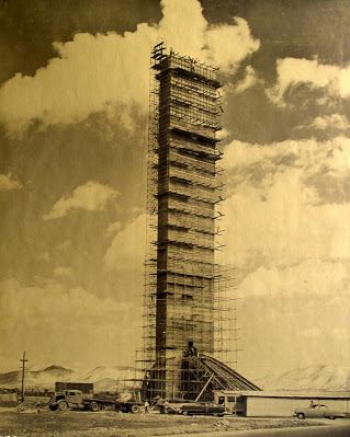 Obelisco de Barquisimeto durante su construcción